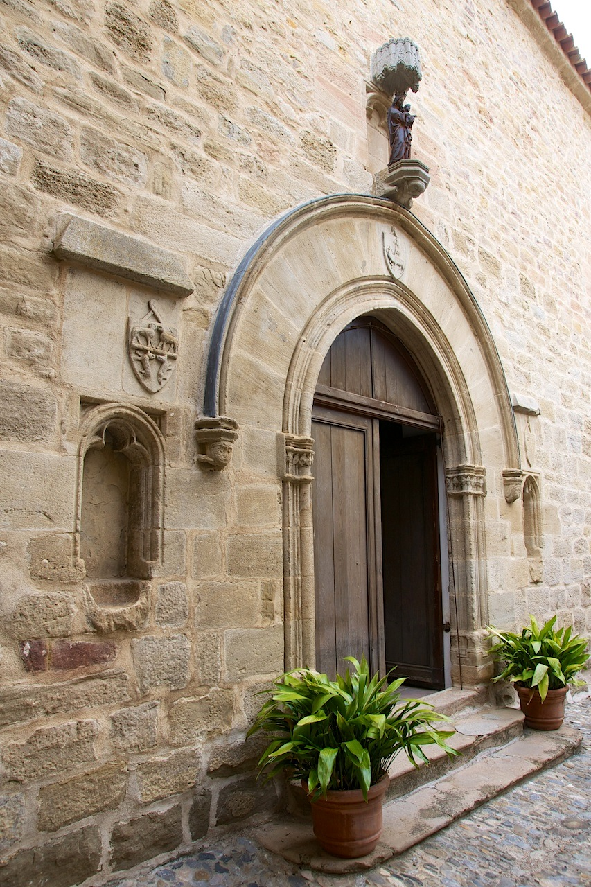 Église de Loupia (Aude, Languedoc-Roussillon, France), le portail. .